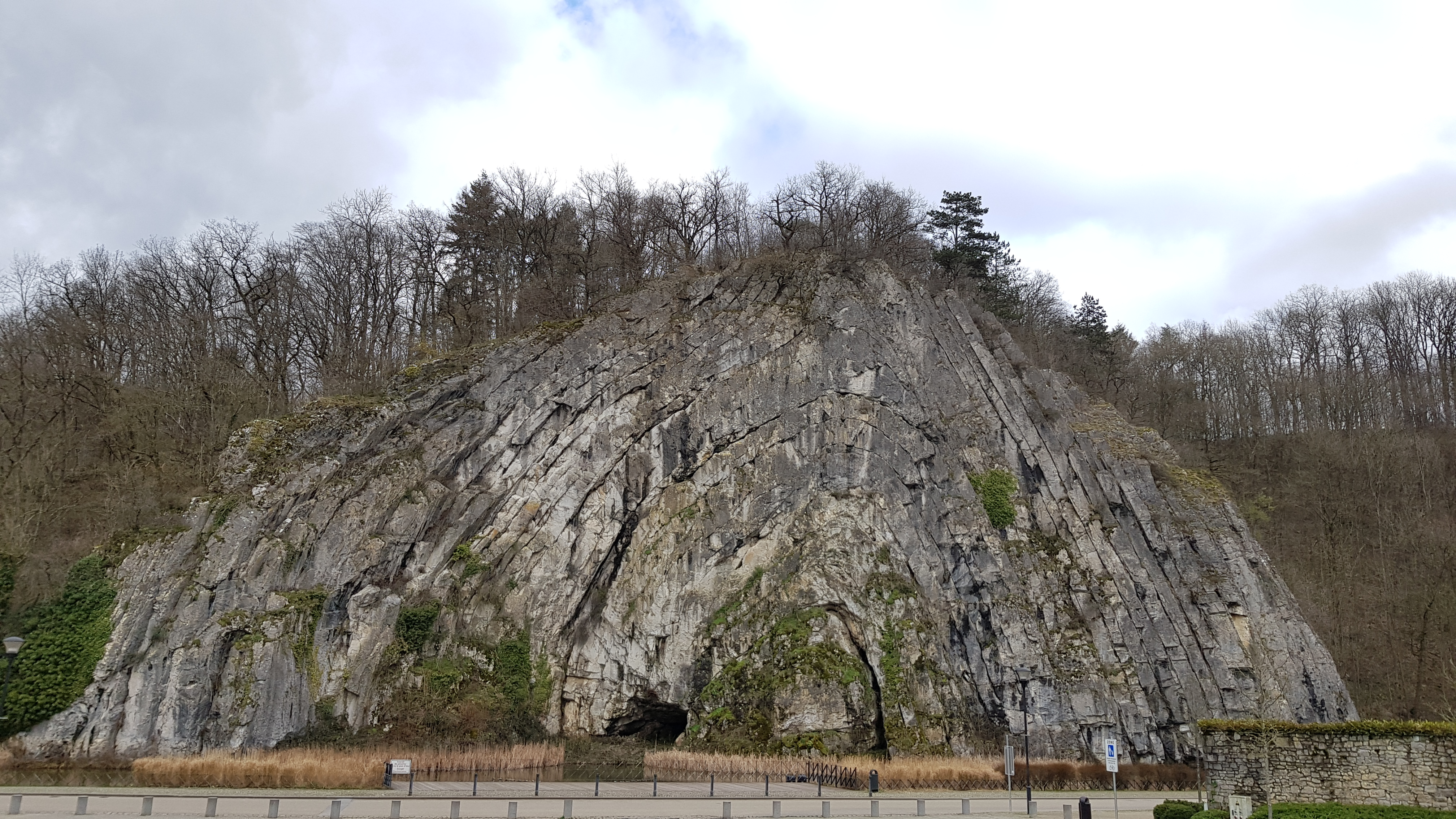 Anticlinal de Durbuy, Belgique